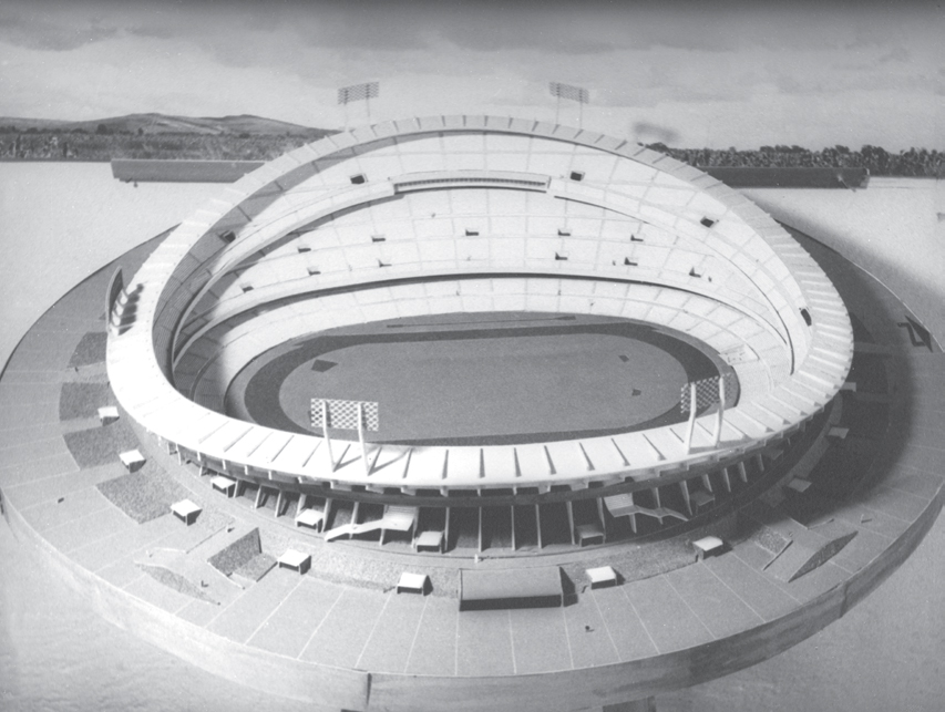 Maqueta del proyecto de ampliación del Estadio para la Olimpiada de 1968 en González, Lourdes. "El Estadio Olímpico Universitario del Pedregal. Permanencia y vigencia", Revista Arquitectura vol. 21, UNAM, 201, pp. 34